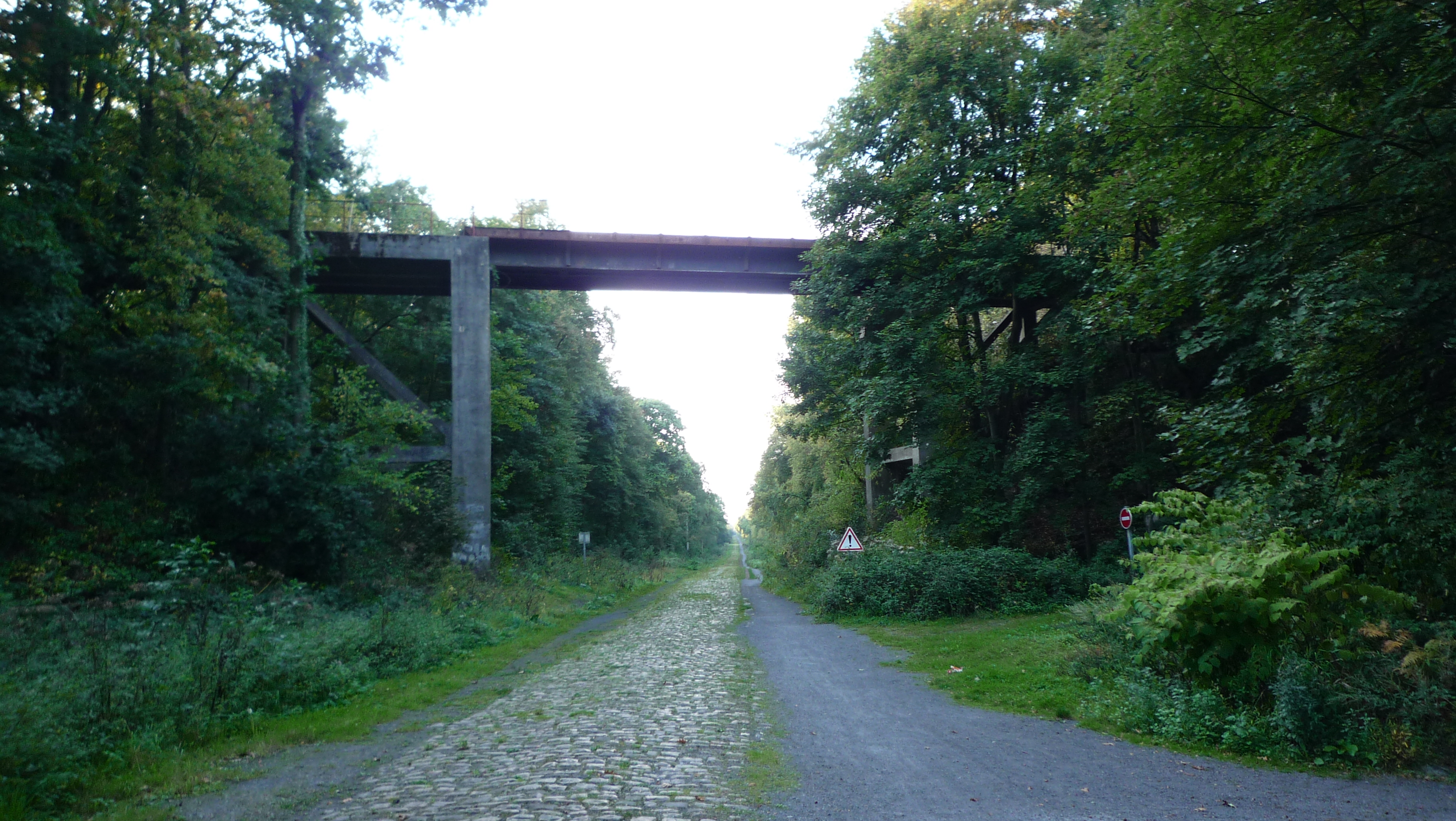 Terril n° 171 dit Mare à Goriaux, fosse Arenberg de la Compagnie des mines d'Anzin dans le bassin minier du Nord-Pas-de-Calais, Wallers et Raismes, Nord, Nord-Pas-de-Calais, France. Le terril no 171 est inscrit sur la liste du patrimoine mondial de l'Unesco le 30 juin 2012 et y constitue en partie le site no 15.